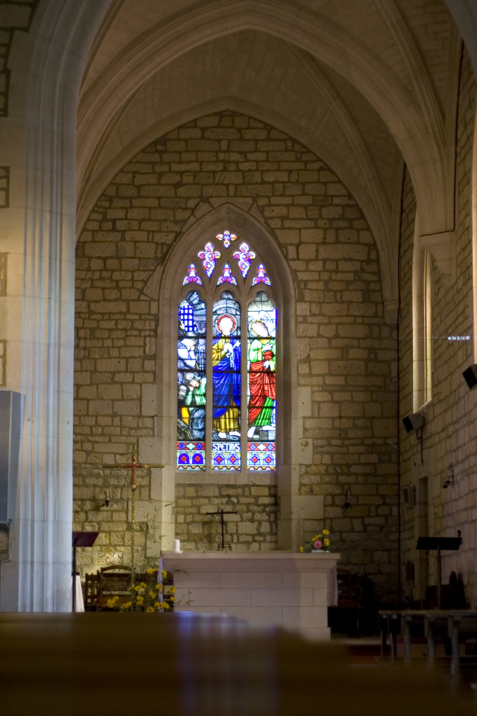 Choeur et autel de l'église Saint-Pierre d'Aiffres